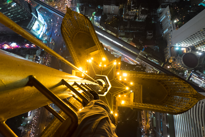 Toiturophillie sur un toit de Bangkok